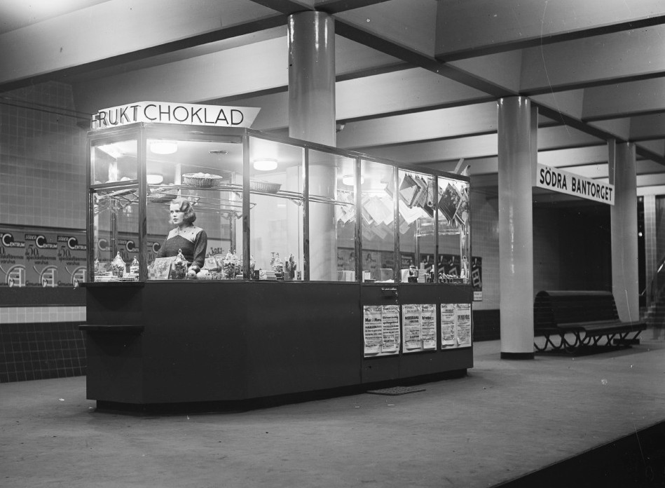 Station Södra Bantorget, idag Medborgarplatsen (tunnelbanestation). Pressbyråns kiosk sedd från norr.